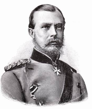 Albrecht von Preußen